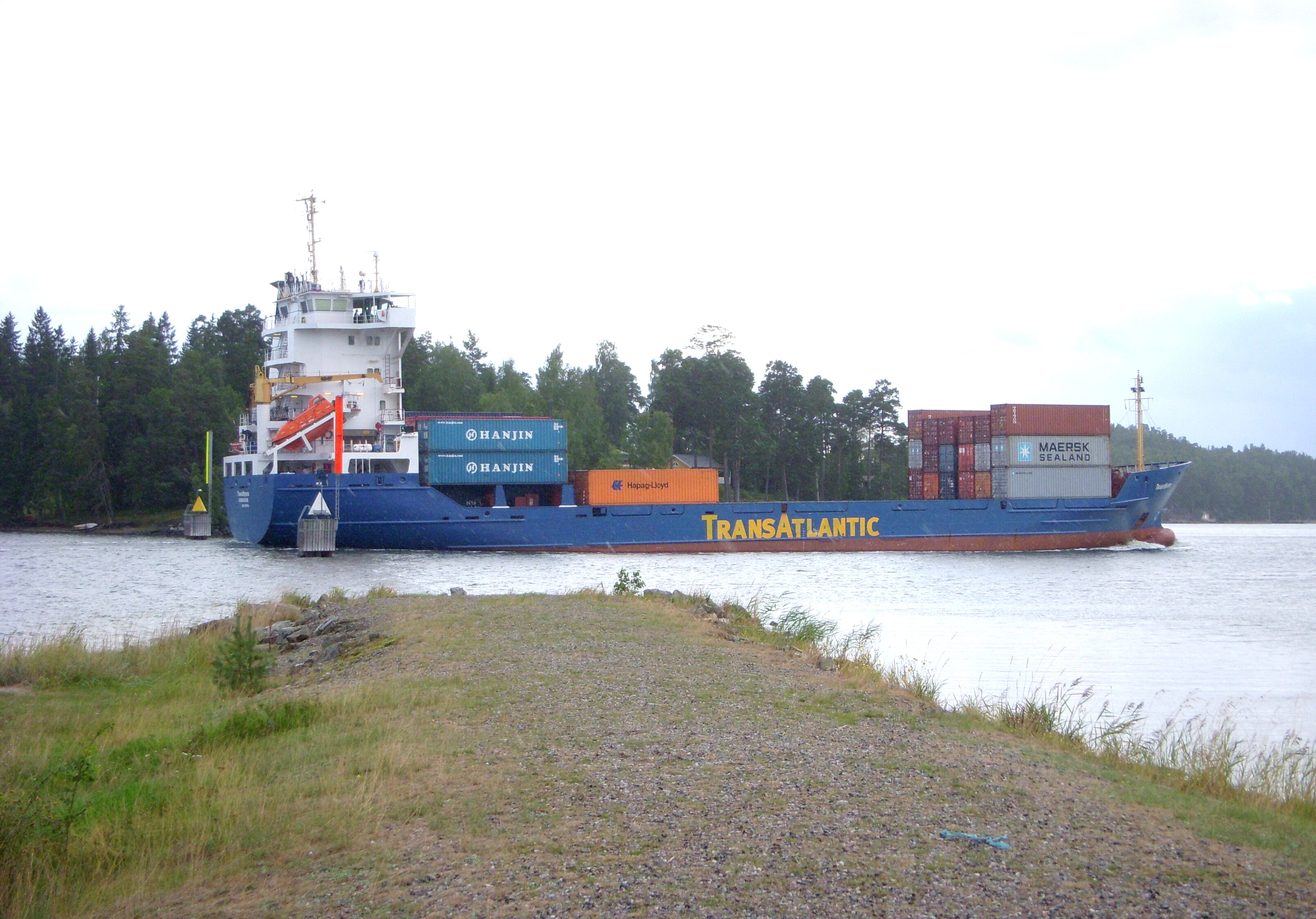 Brandalsund